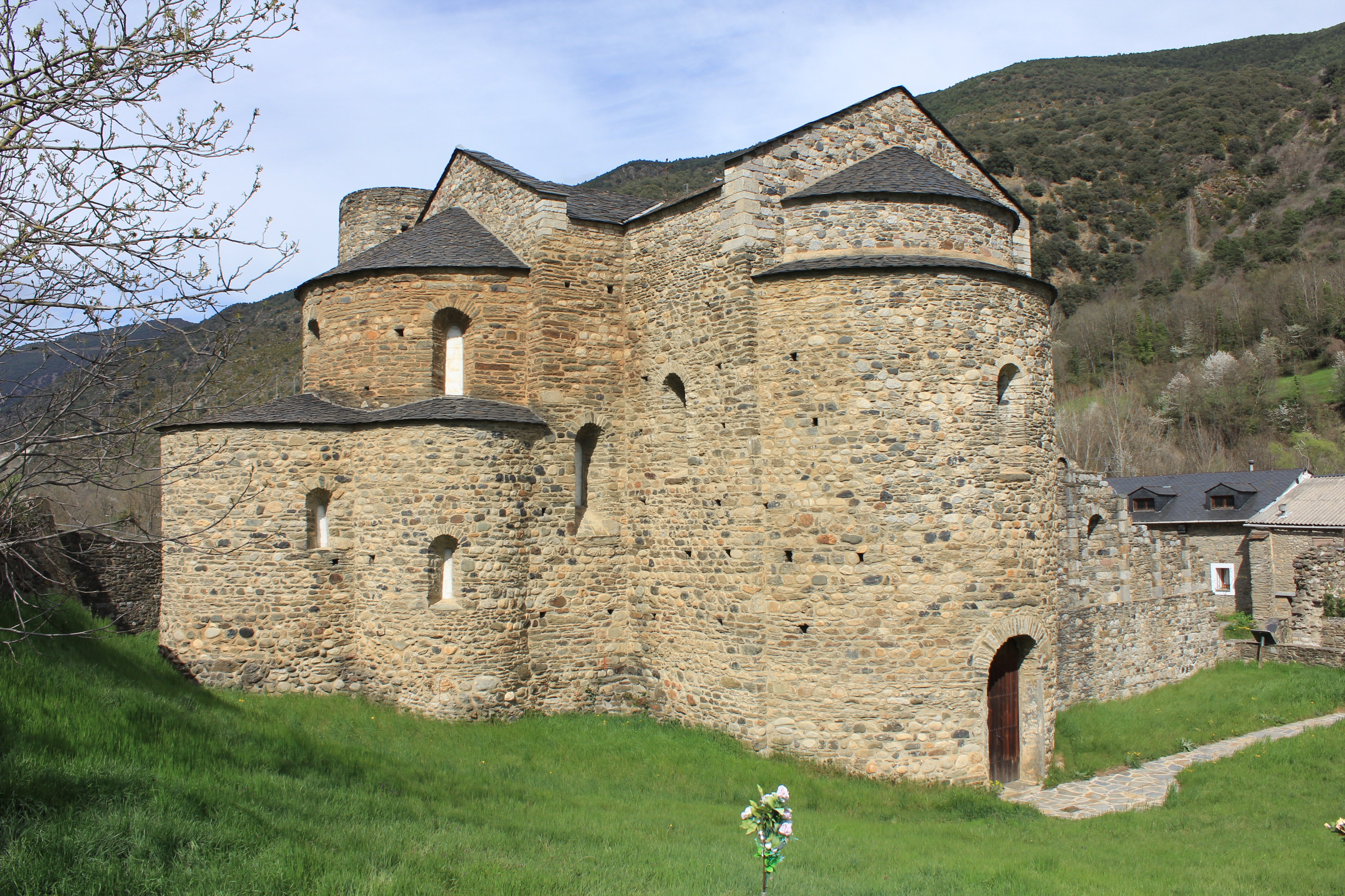 Monestir de Sant Sadurní de Tavèrnoles (les Valls de Valira)